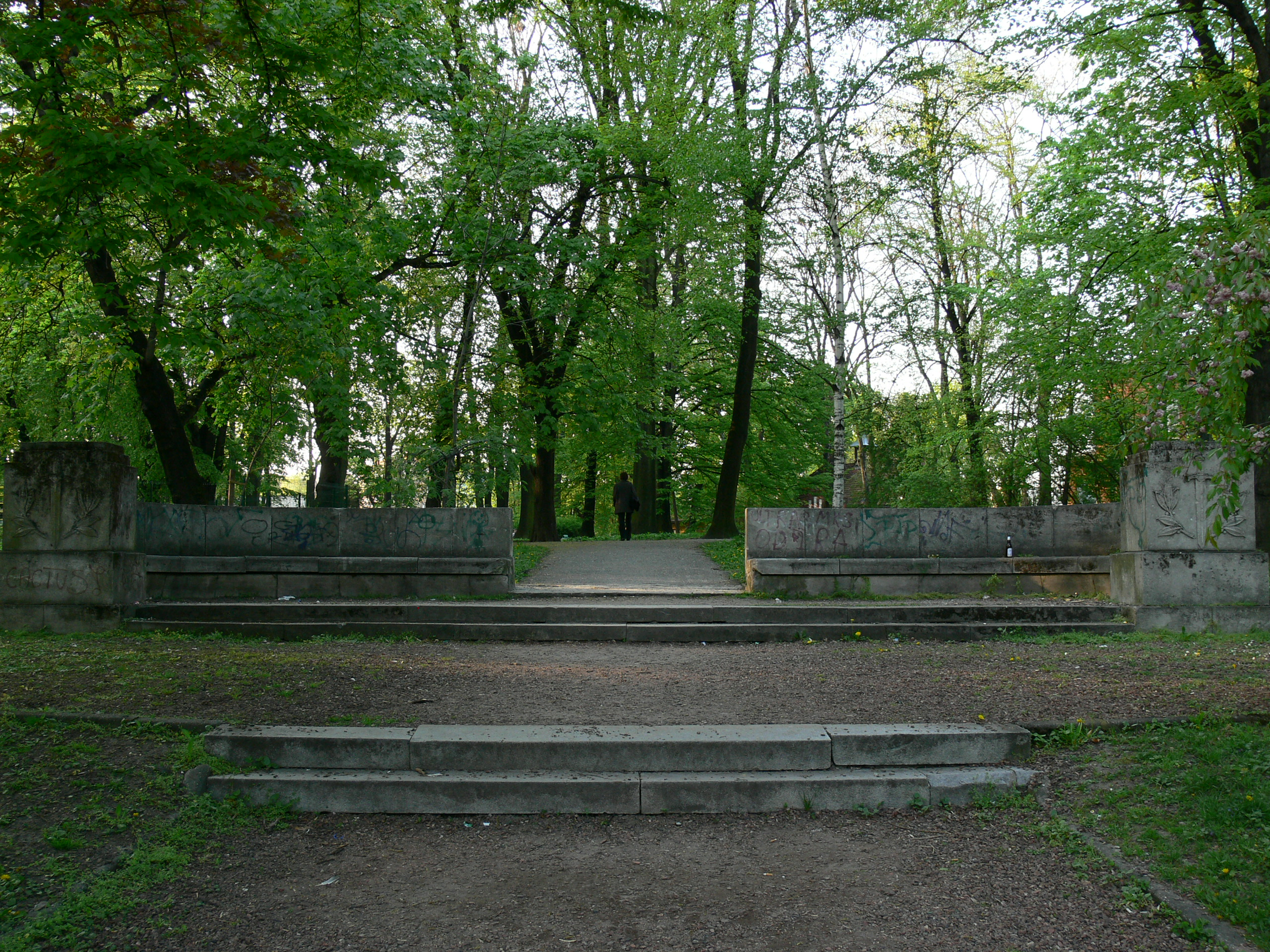 Racibórz - Park im. Miasta Roth, pozostałości po pomniku poległych w czasie I wojny światowej